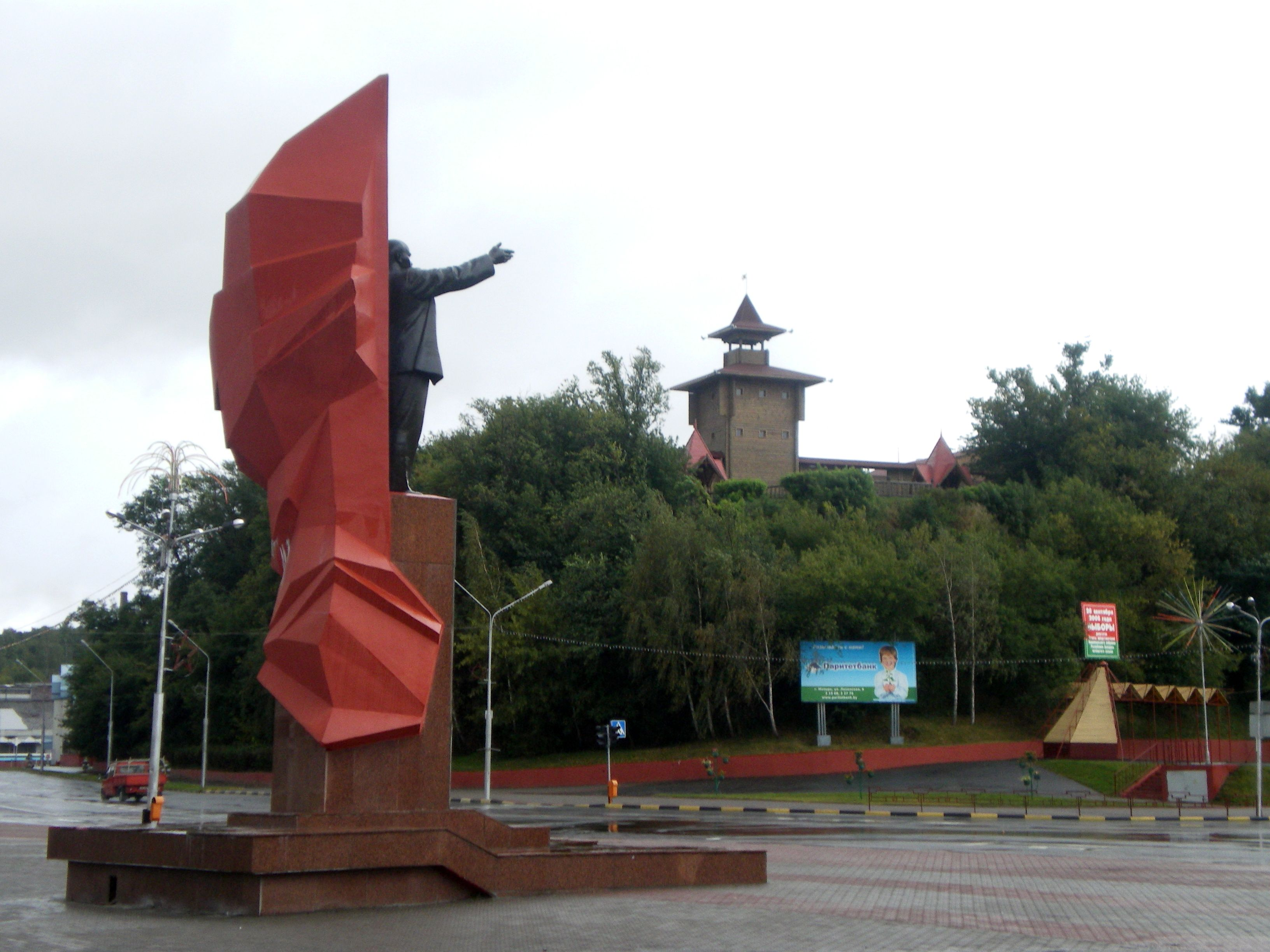 Мозырь.Ленин.